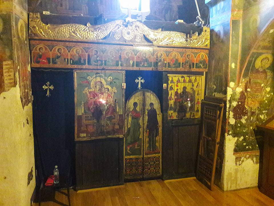 Crkva